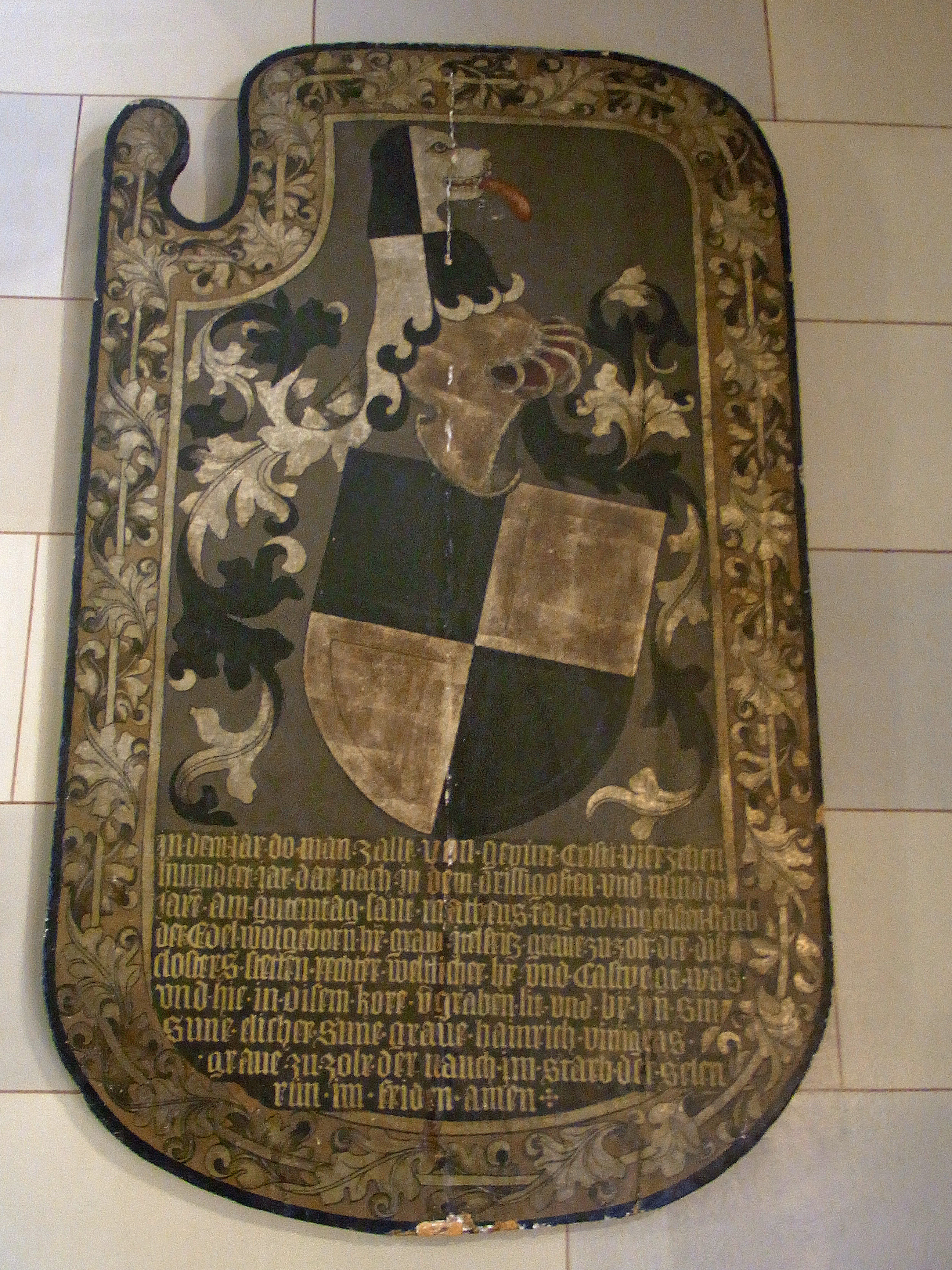 Burg Hohenzollern: Michaelskapelle - Vorraum-Totenschild Eitel Friedrichs I - ehemals Kloster Stetten